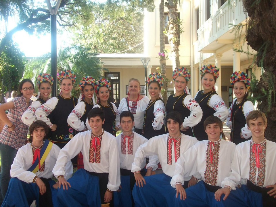 decendientes